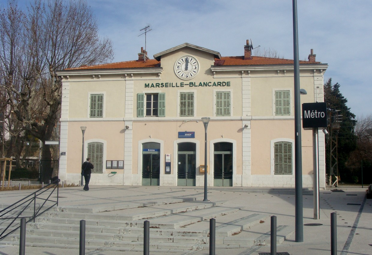 Gare de Marseille-Blancarde : la façade côté rue avec son nouveau parvis.